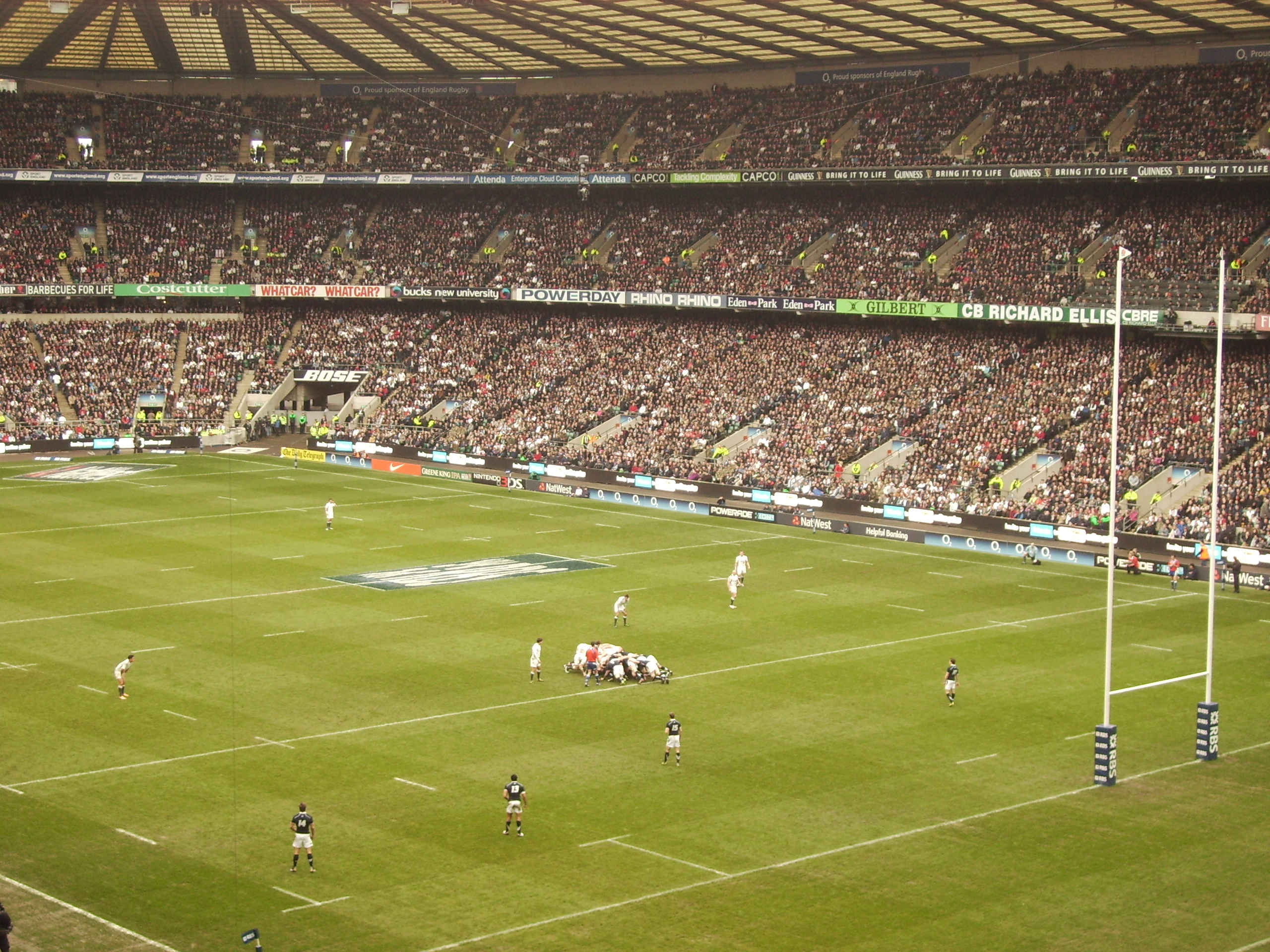 England Schottland Rugby